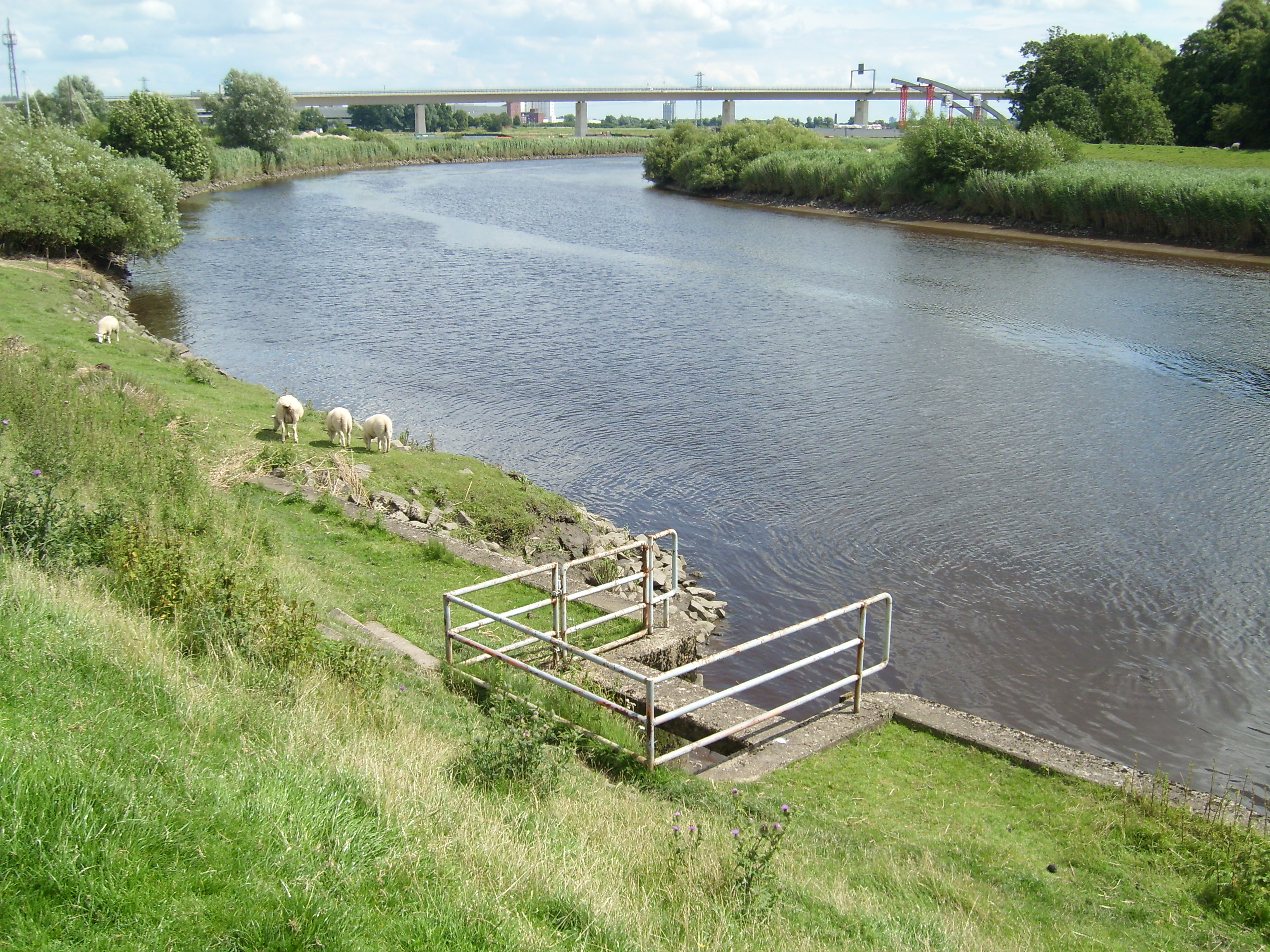 Stör in Heiligenstedten (Blick störaufwärts); im Hintergrund die Störbrücke, im Vordergrund das Herrschaftliche Siel